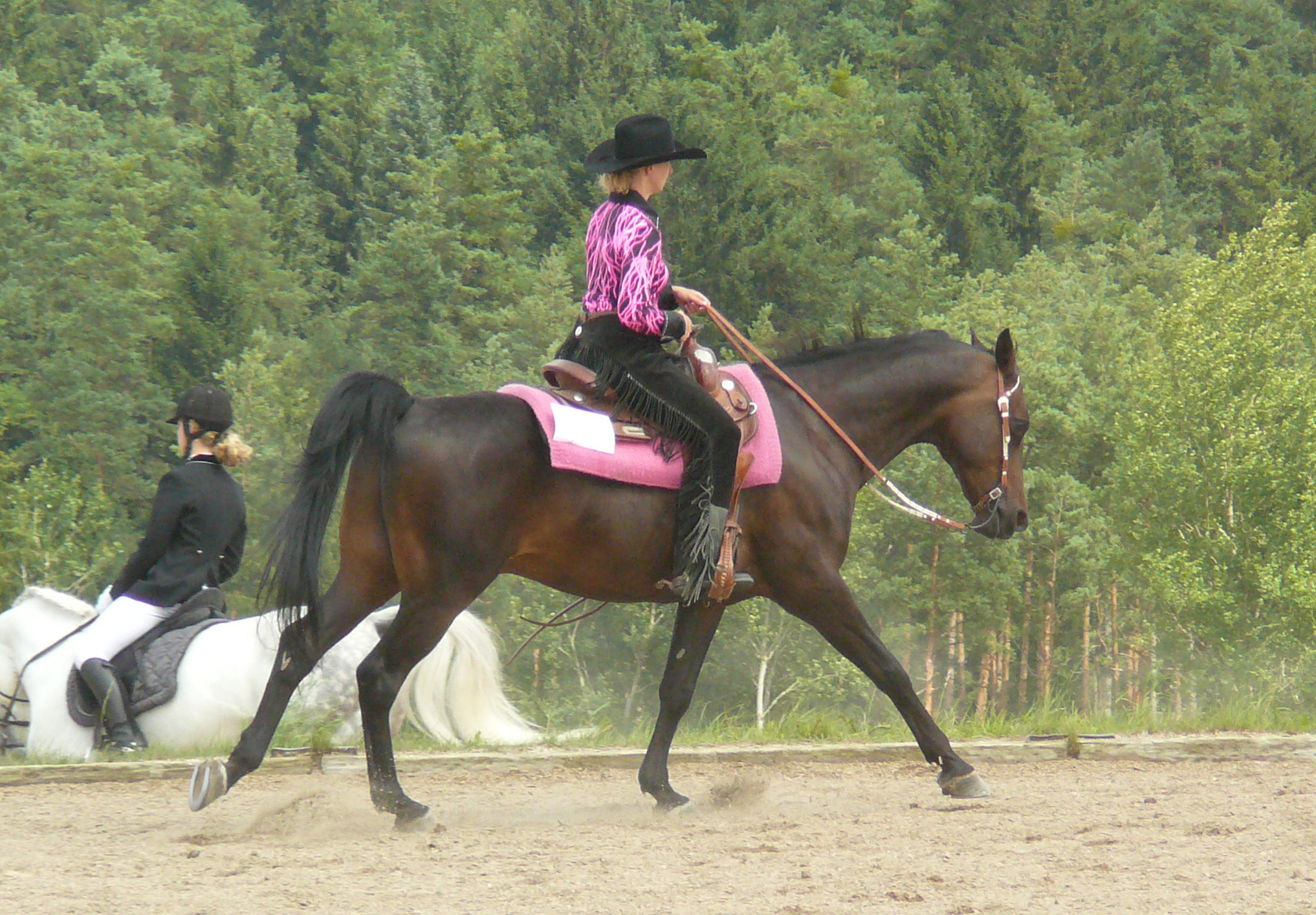 Un cheval shagya monté en équitation western